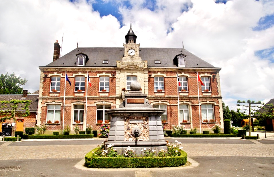 La Mairie et la Fontaine